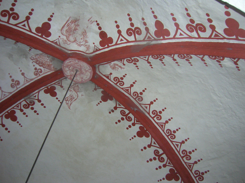 Gewölbemalerei in der Stadtkirche Gadebusch